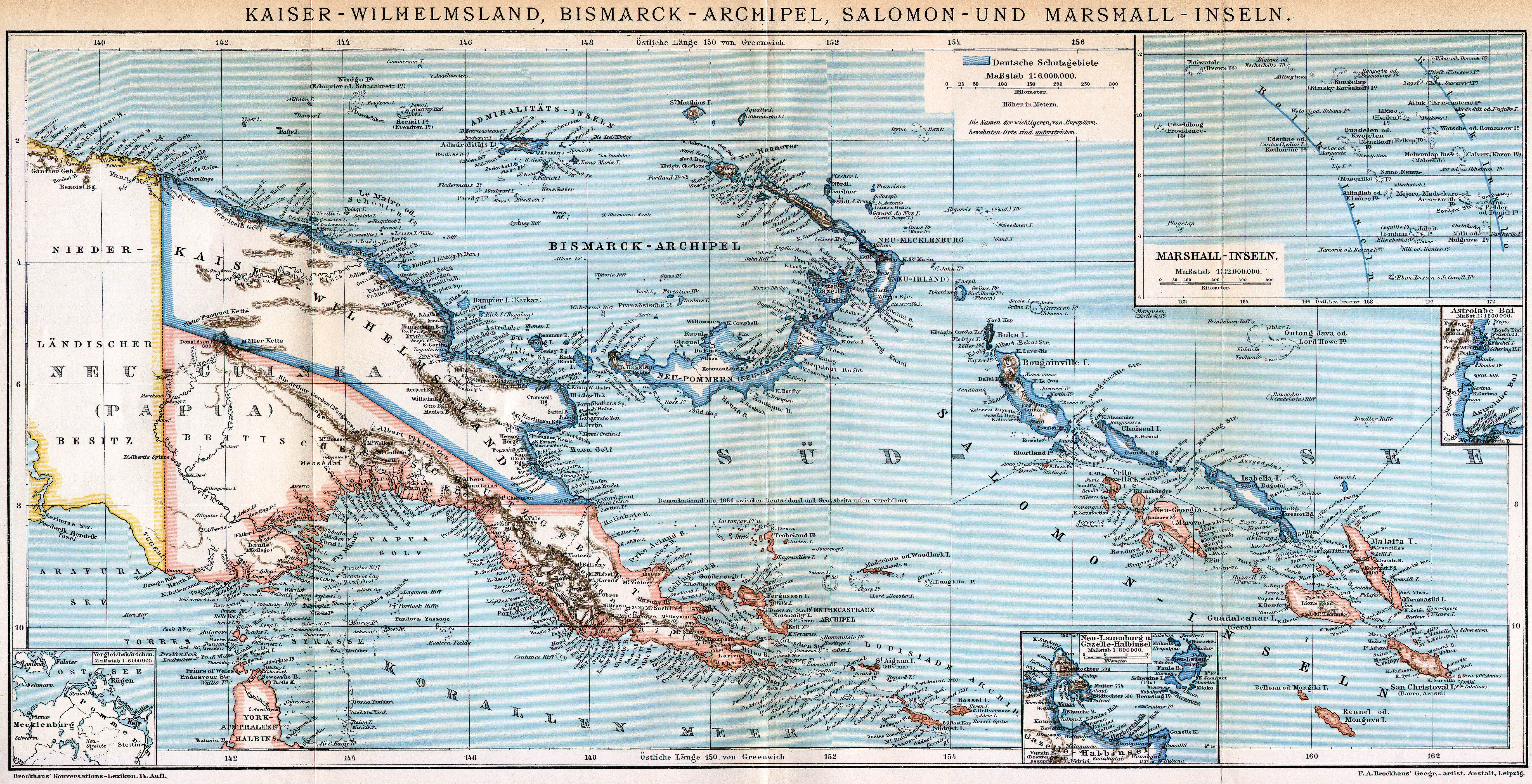 Kaiser-Wilhelms-Land, Marshall-Inseln, Salomonen (heute Papua-Neuguinea, Marshall-Inseln, Salomonen)